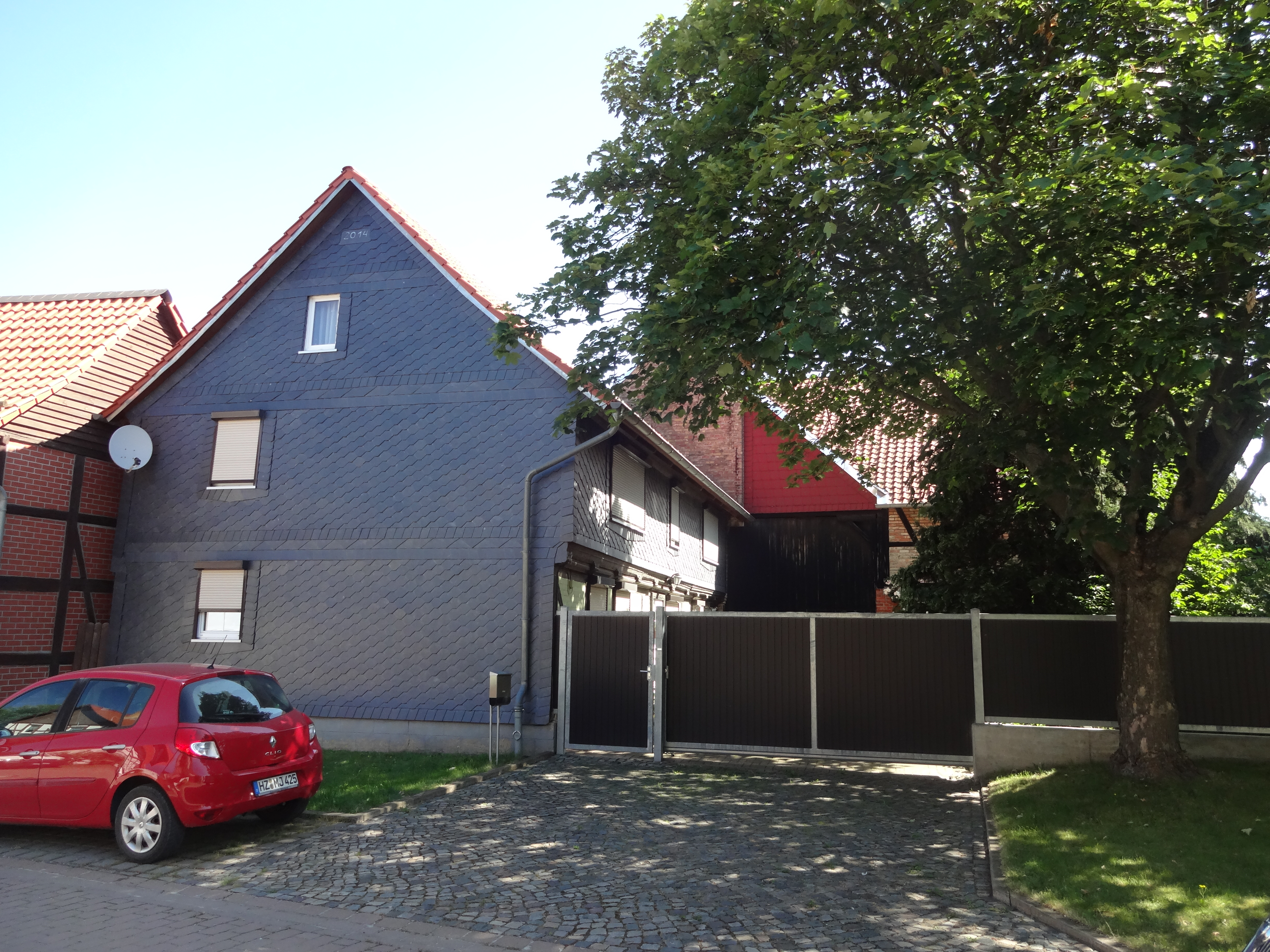 denkmalgeschütztes Bauernhaus in der Faktoreistraße 2 in Langeln, Gemeinde Nordharz)